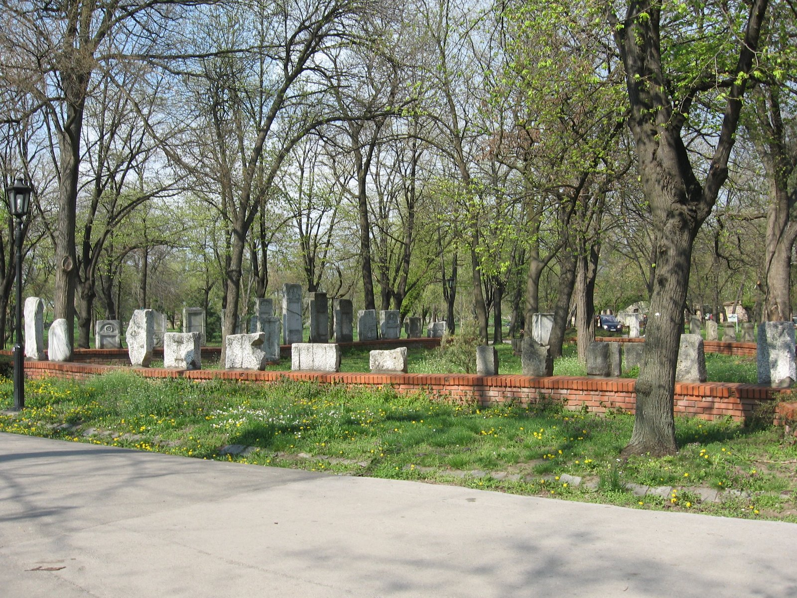 Липадаријум у Нишкој тврђави. Снимљено у априлу 2010.